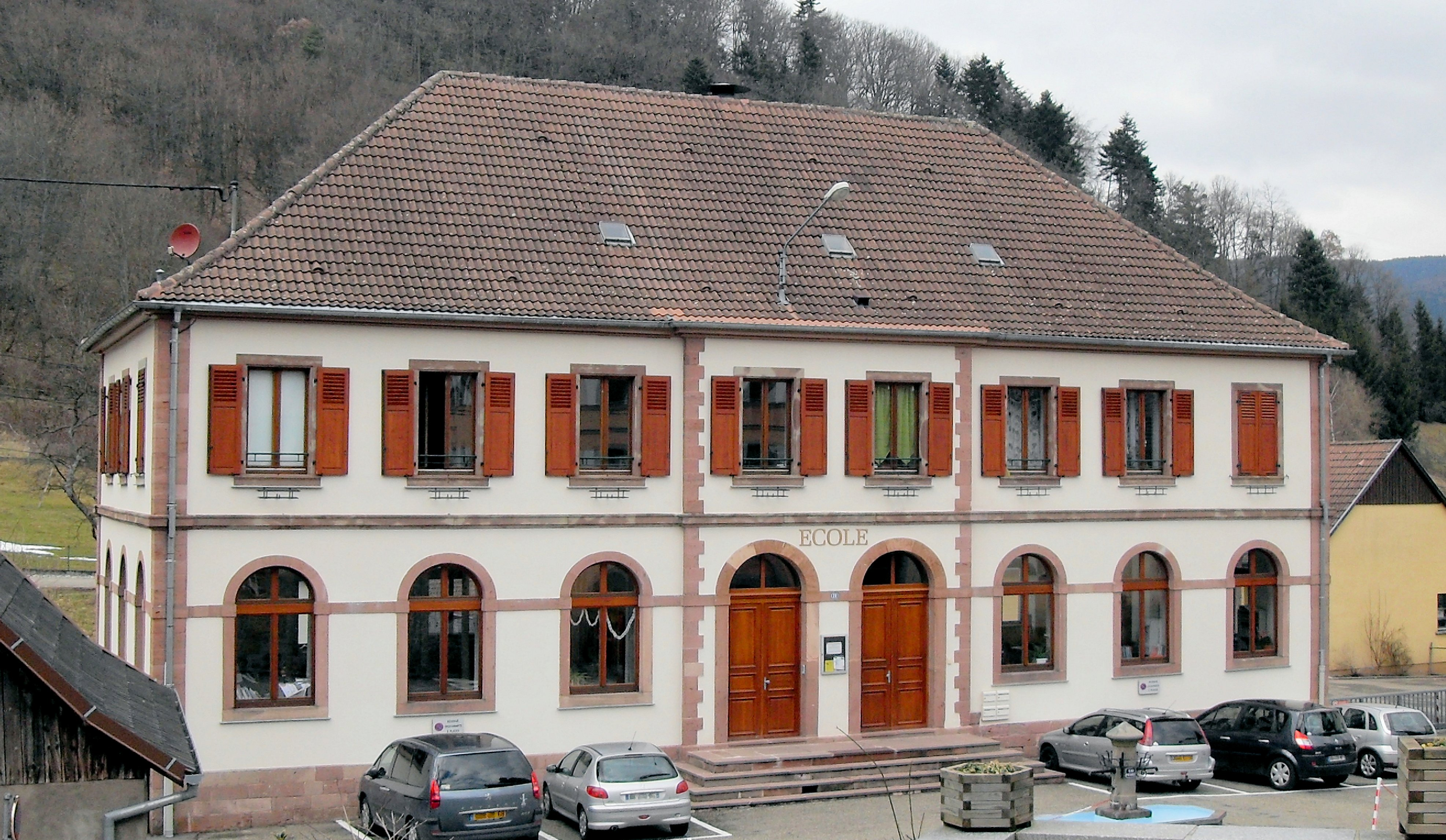 L'école de Griesbach-au-Val